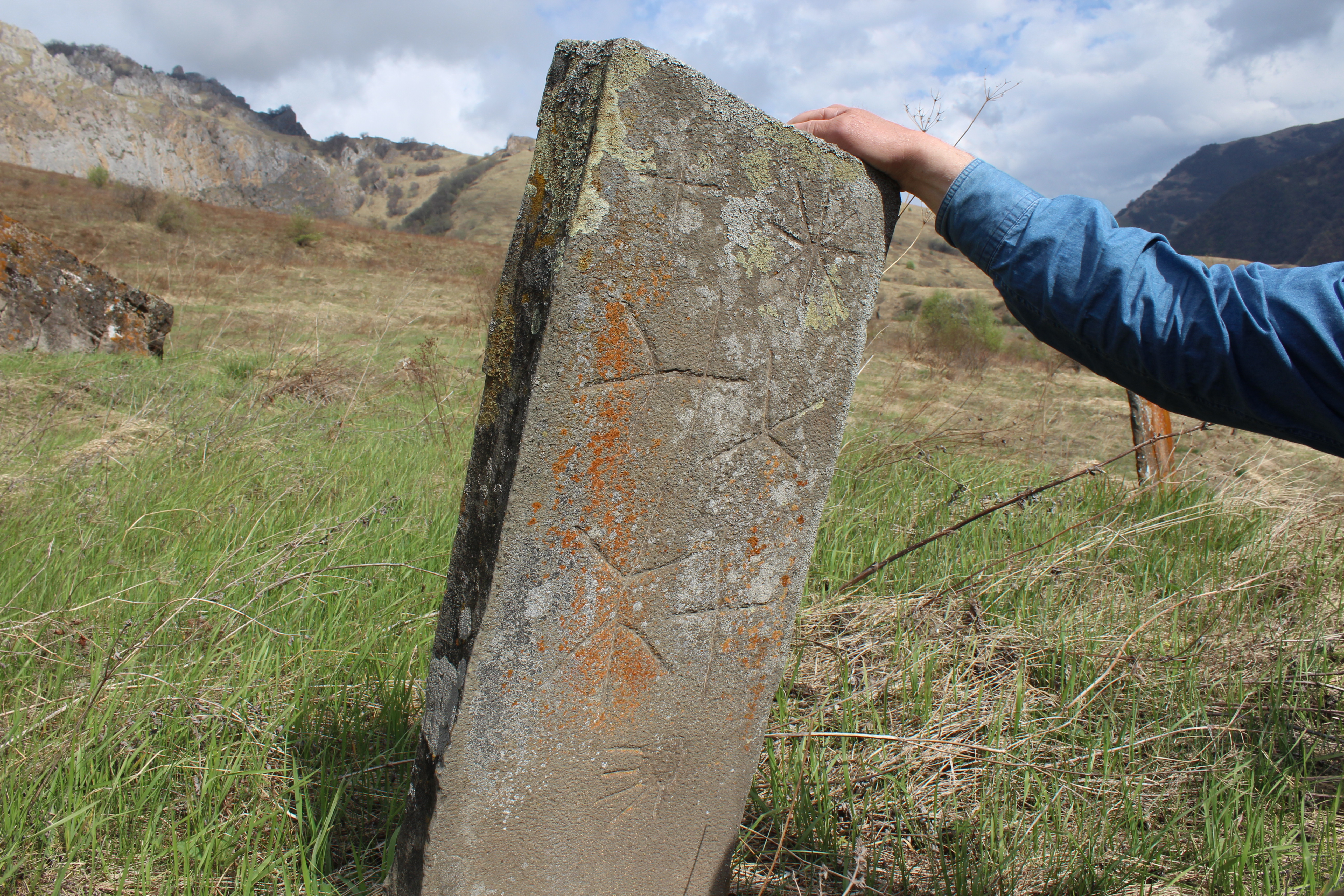 В Нашха на северо западе селения Моц1ара находятся кладбище Гендаргной кешнаш. Возраст кладбищ точно не установлено , по могильным камням видно, что они до Христианского периода, так как на этих камнях петрографы .